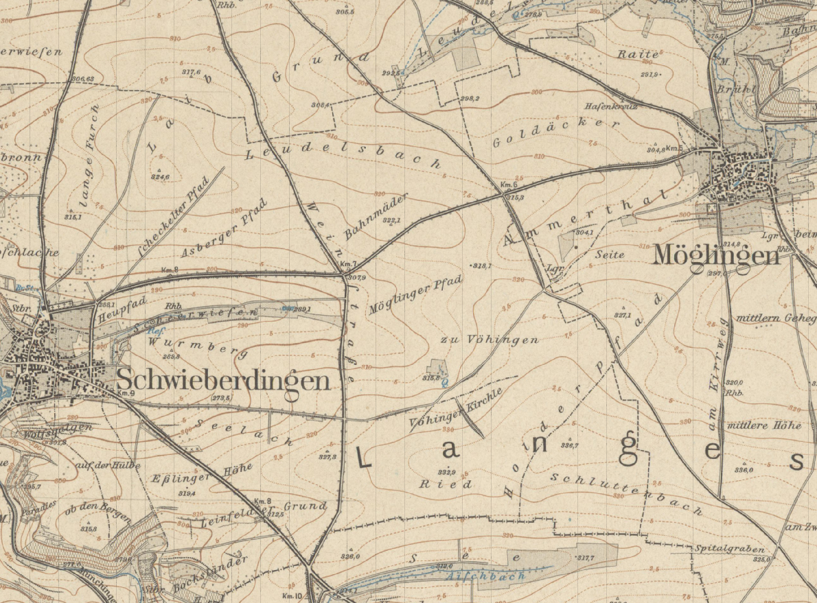 Vöhingen auf einem Ausschnitt der Topographischen Karte 7120 (Leonberg) von 1896, Maßstab 1:25.000